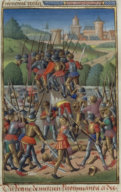 Fuite du roi Bituit devant Fabius et les troupes romaines. Fuite de Bituit devant Fabius, miniature médiévale issue du Speculum historiale de Vincent de Beauvais. XIVème siècle, BnF, Folio 164v.